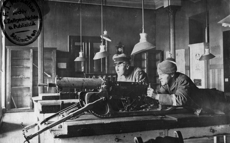 Maschinengewehr im Maximilianmuseum